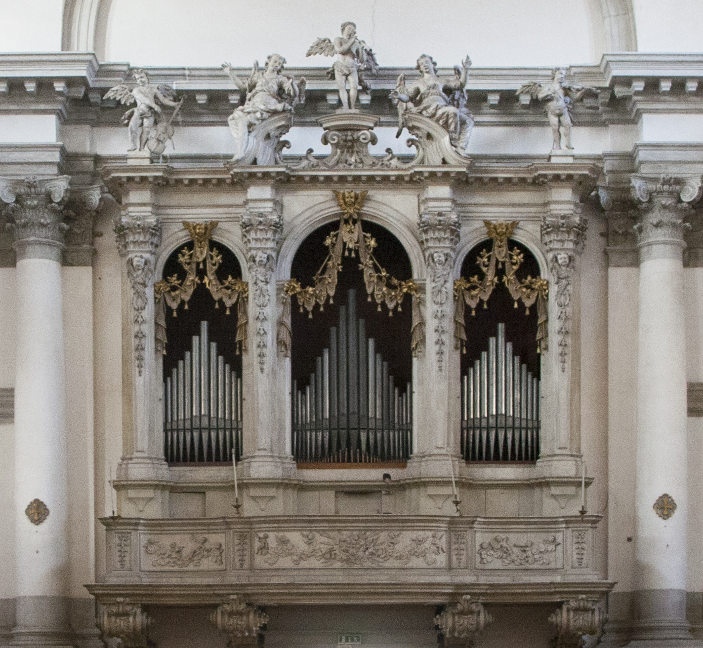 Organo Callido, ciesa di San Stae, Venezia